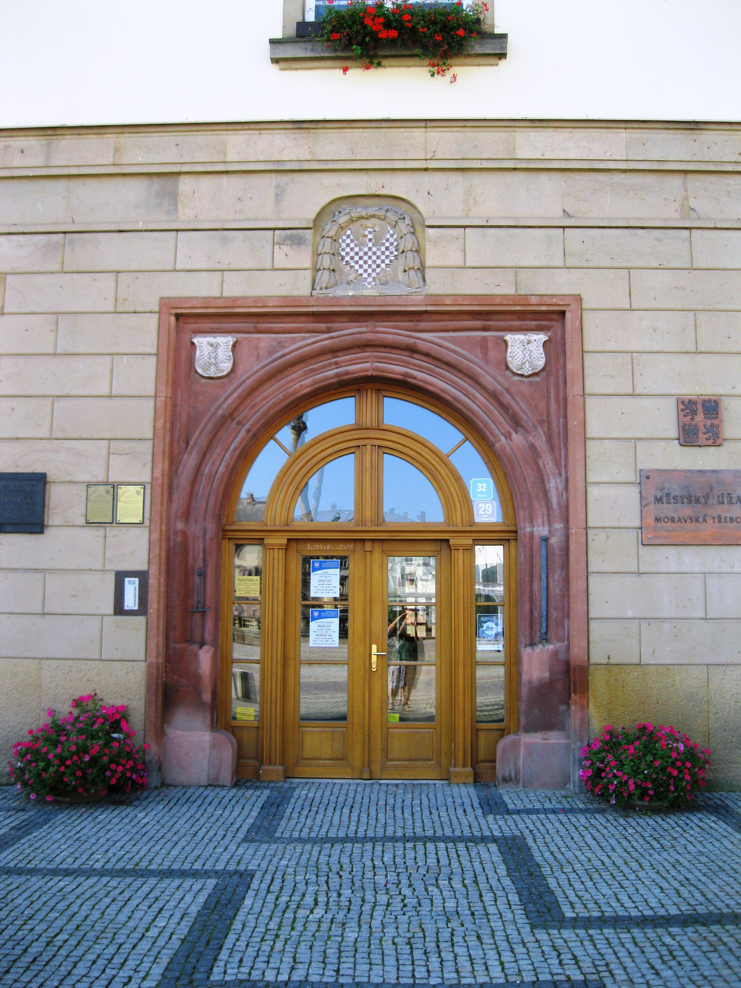 Radnice (Moravská Třebová)